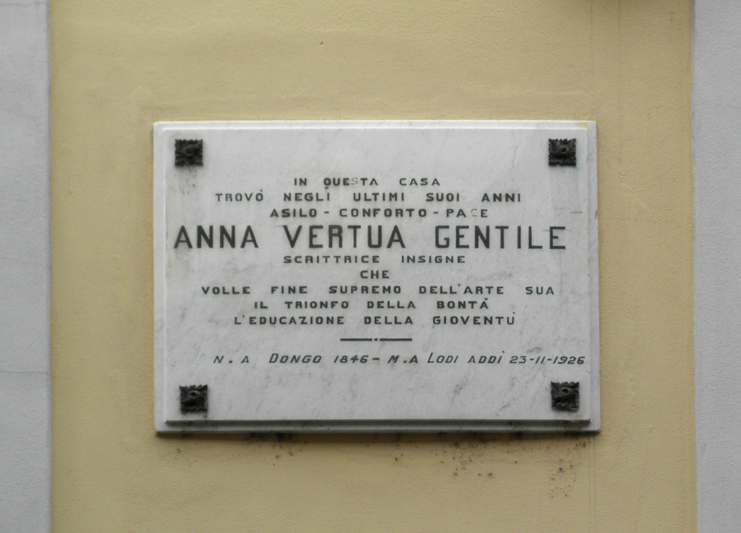 Lapide in memoria di Anna Vertua Gentile in via De Lemene 13 a Lodi.